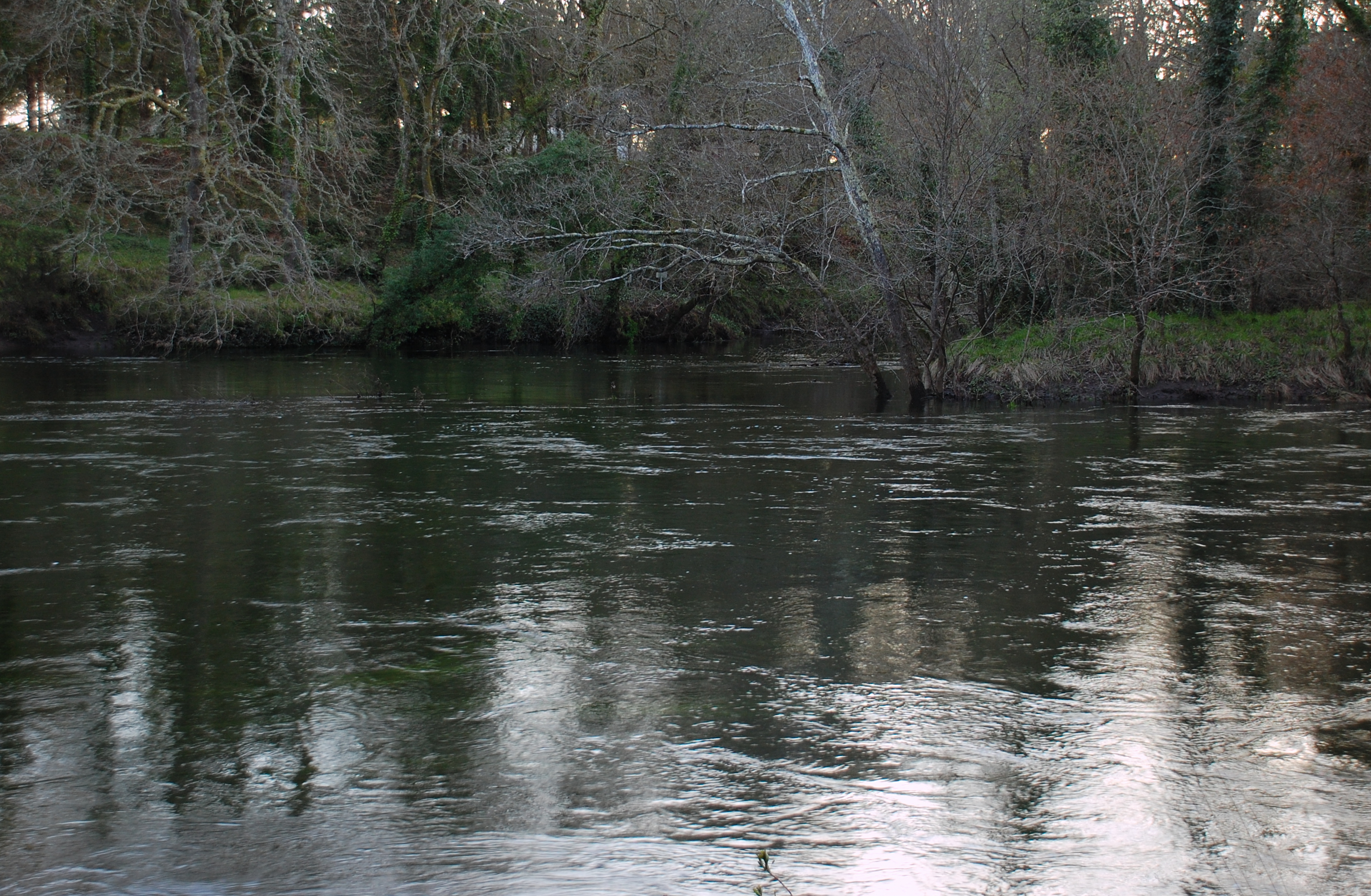 Xunta dos ríos Parga e Ladra.